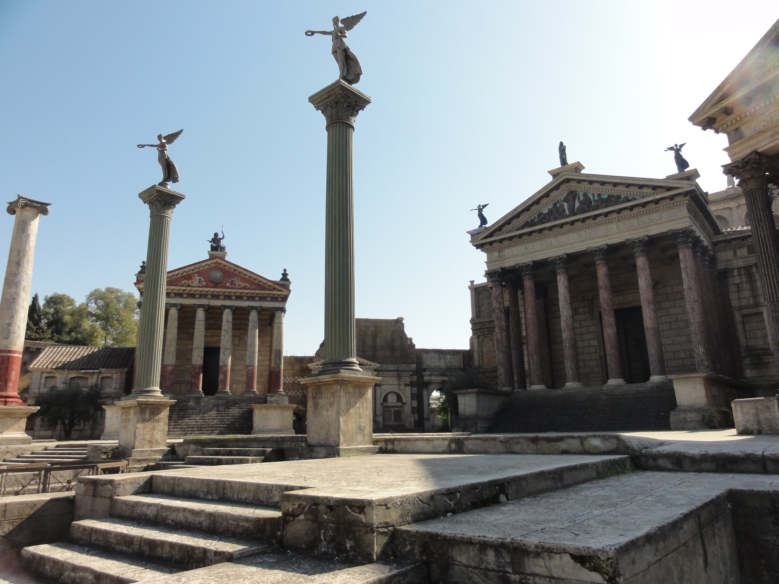 Scenografia di "Rome"